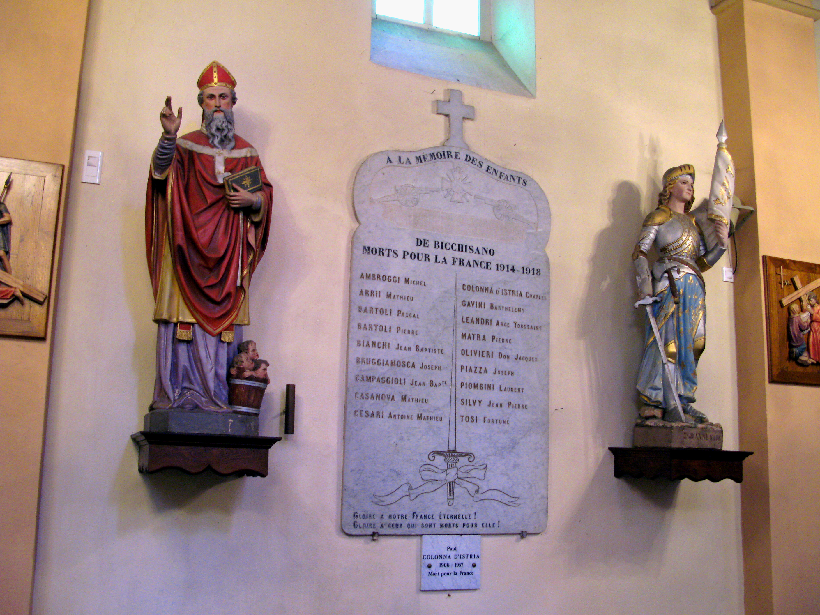 Petreto-Bicchisano (Corse-du-Sud, France) - Eglise. Plaque (apposée sur le mur Nord à l'intérieur de l'église) mentionnant les soldats tués lors de la Première Guerre Mondiale et encadrée de statues : à gauche, Saint Nicolas de Myre, identifiable par le seau en bois cerclé de métal contenant (les têtes de) 3 enfants et posé à sa gauche, à droite, Jeanne d'Arc dont l'identification - bien plus facile par ses attributs très connus (l'armure, l'étendard et l'épée, ainsi que les nombreux motifs en fleur de lys) - est confirmée par l'inscription sur la face frontale du socle.